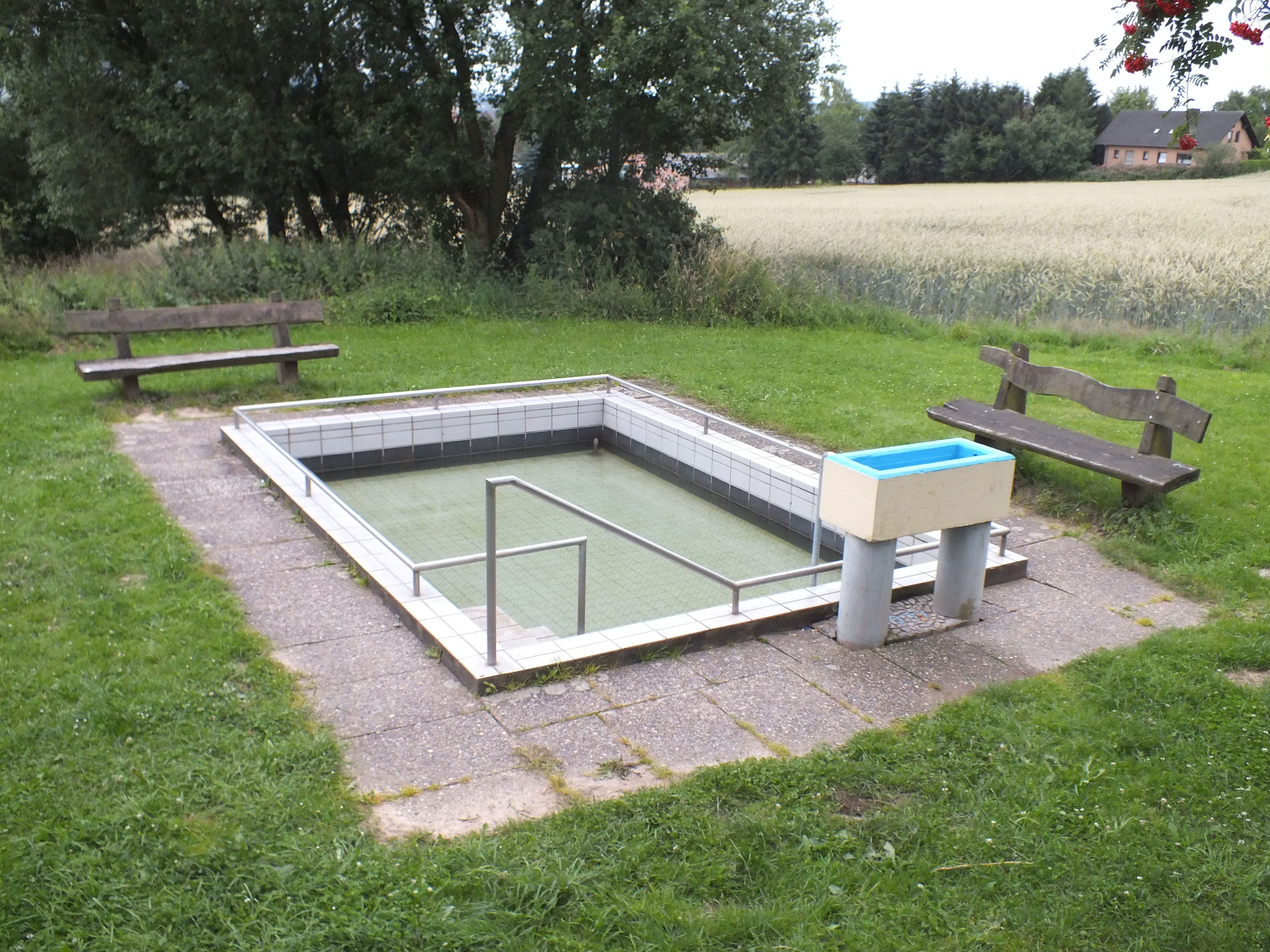 Das Wassertretbecken oberhalb der Grillhütte am Martinsweiher in Schauenburg-Martinhagen.